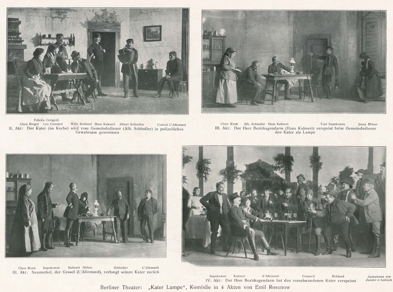 Szenenbilder aus einer Aufführung der Komödie "Kater Lampe" (von Emil Rosenow) durch das Berliner Theater, 1903.